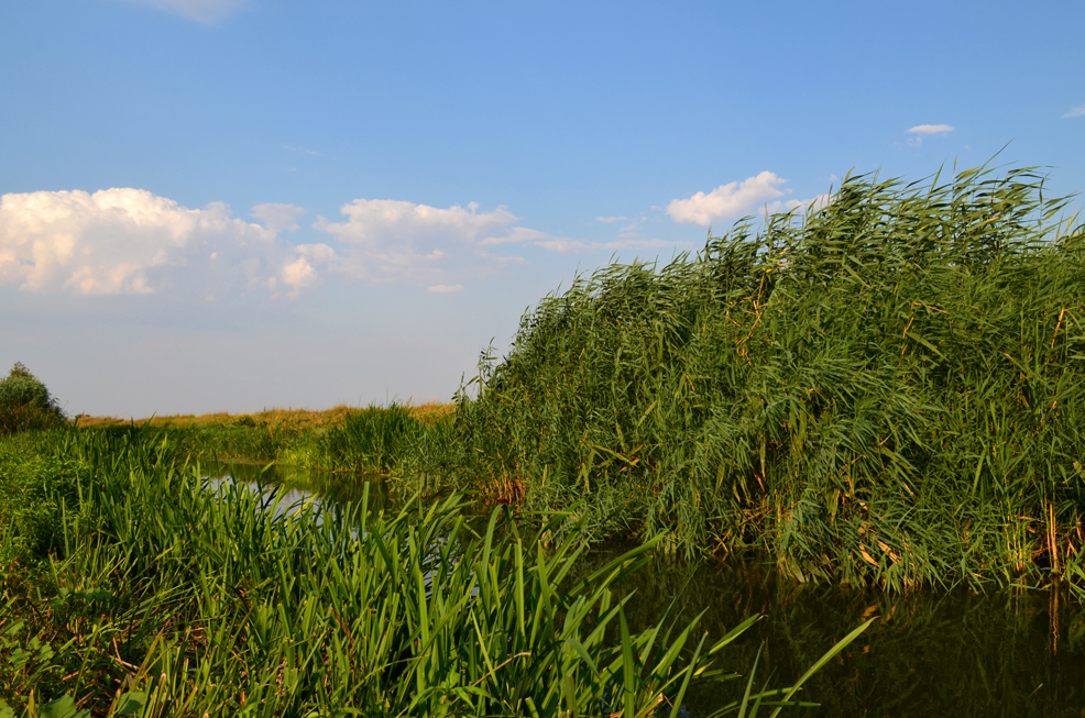 Изглед от река Мочурица